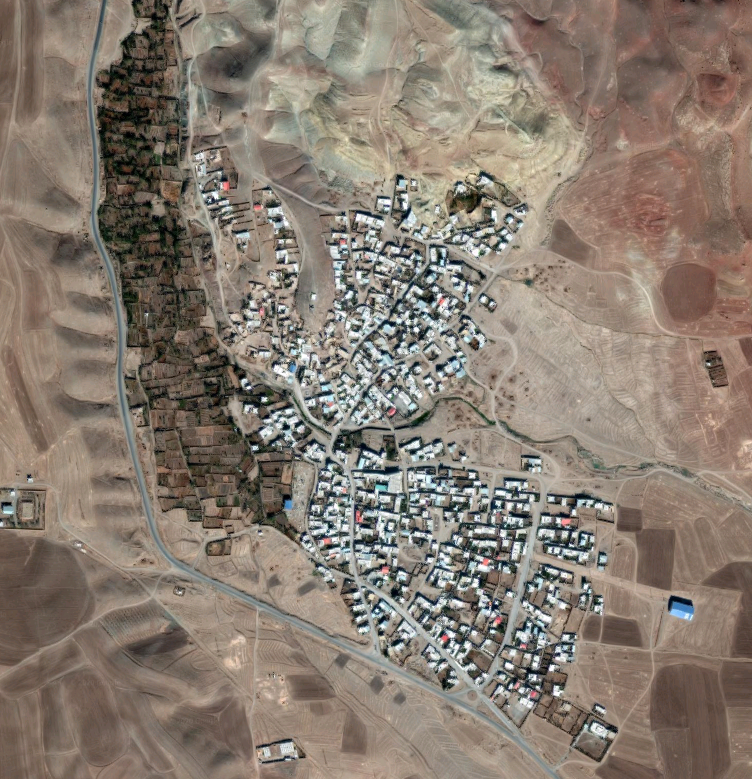 روستای کردیجان ازنمای بالا.